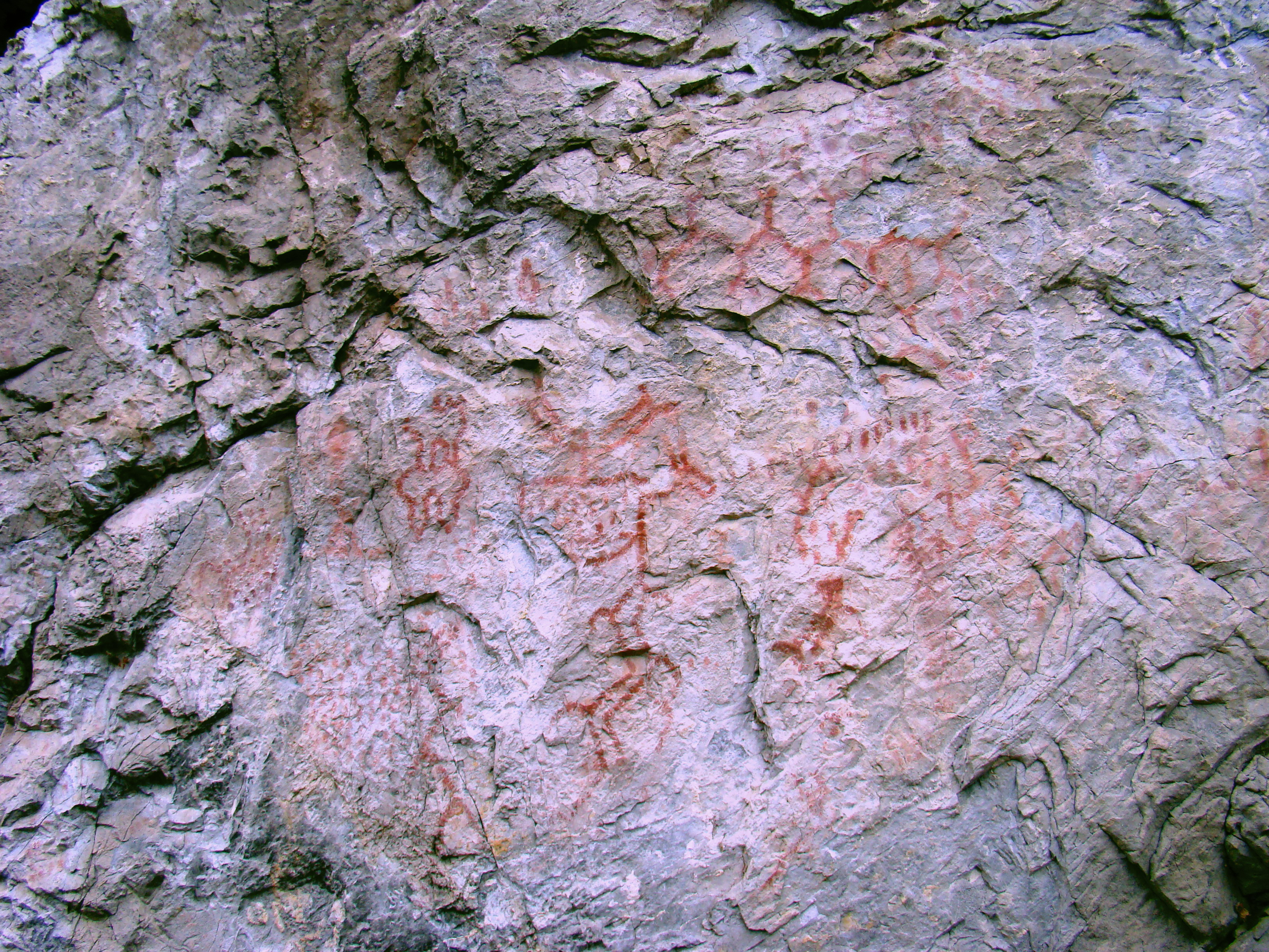 Писаница р. Нейва Neyva river Rock Art